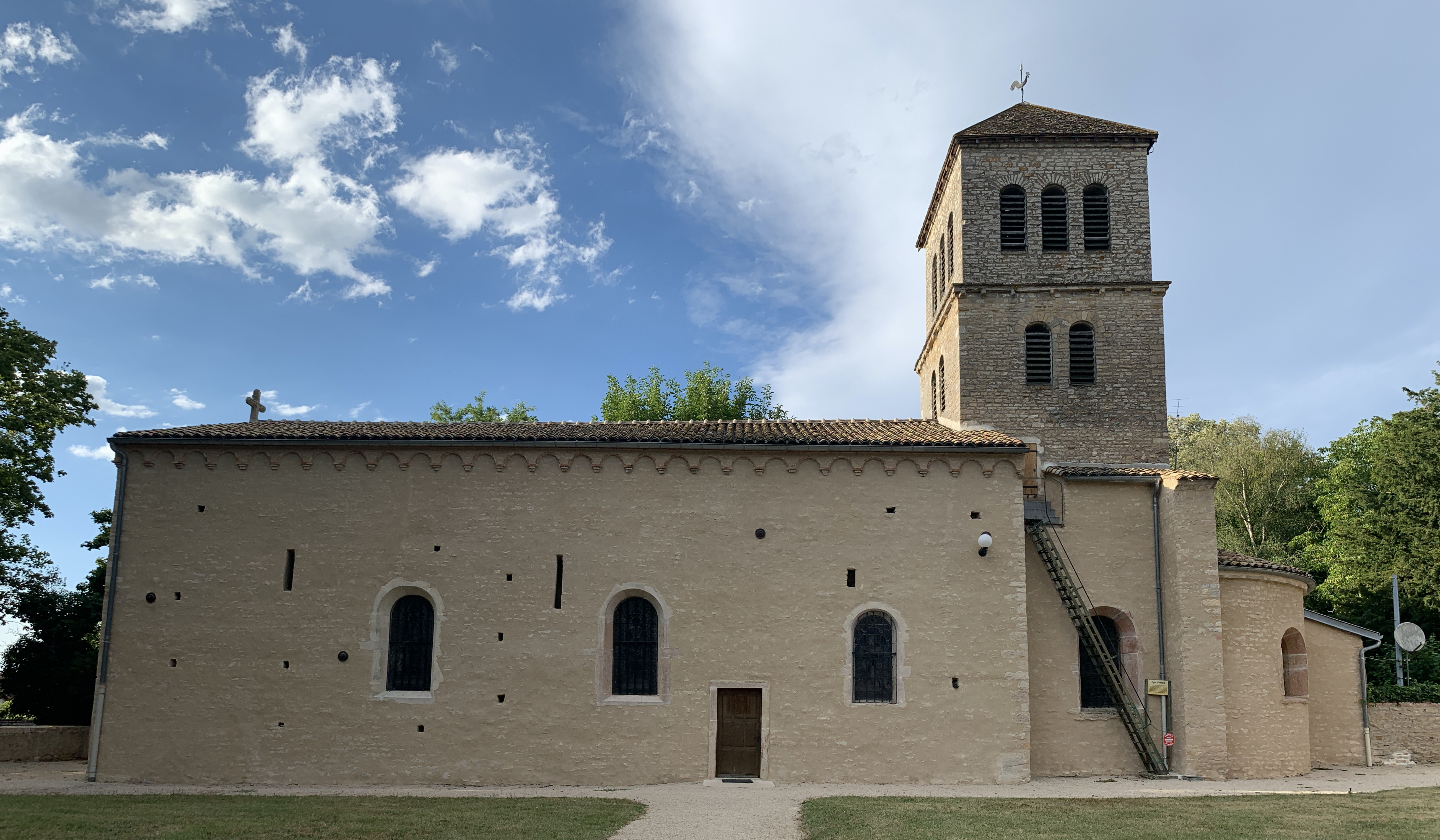 Église Saint-Martin d'Ormes, Saône-et-Loire.